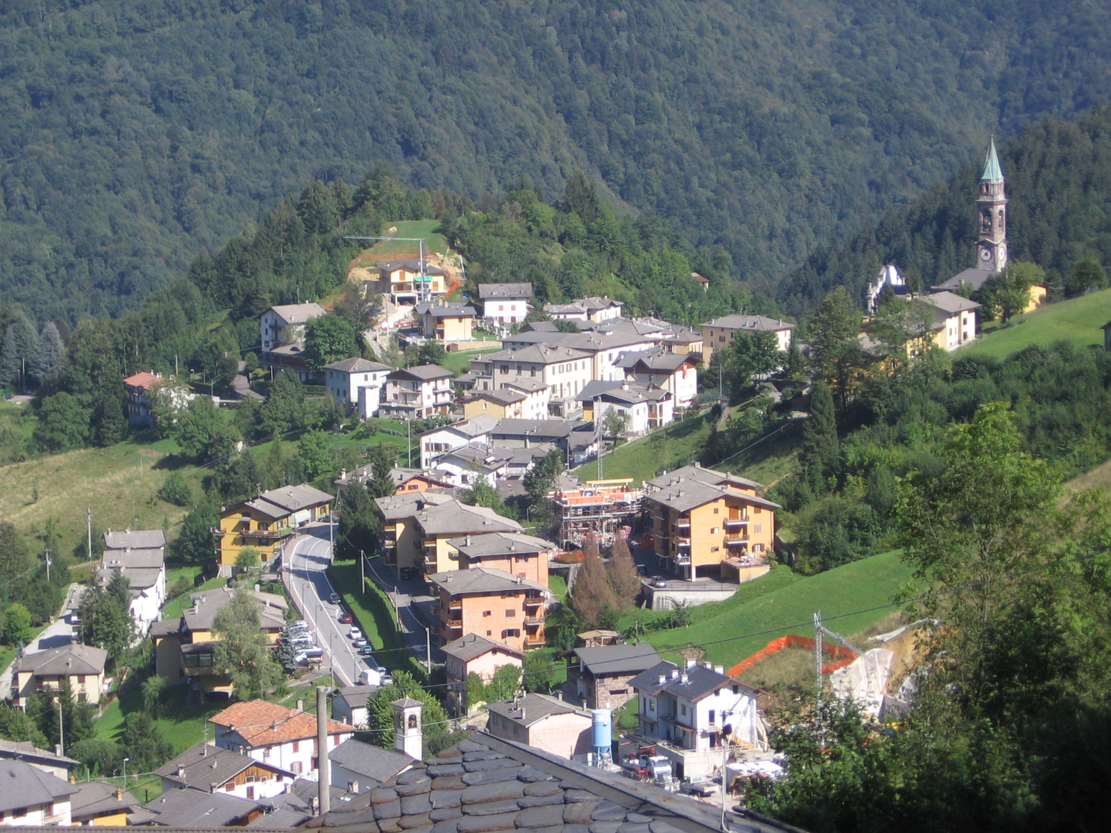 Santa Brigida, Bergamo, Italy